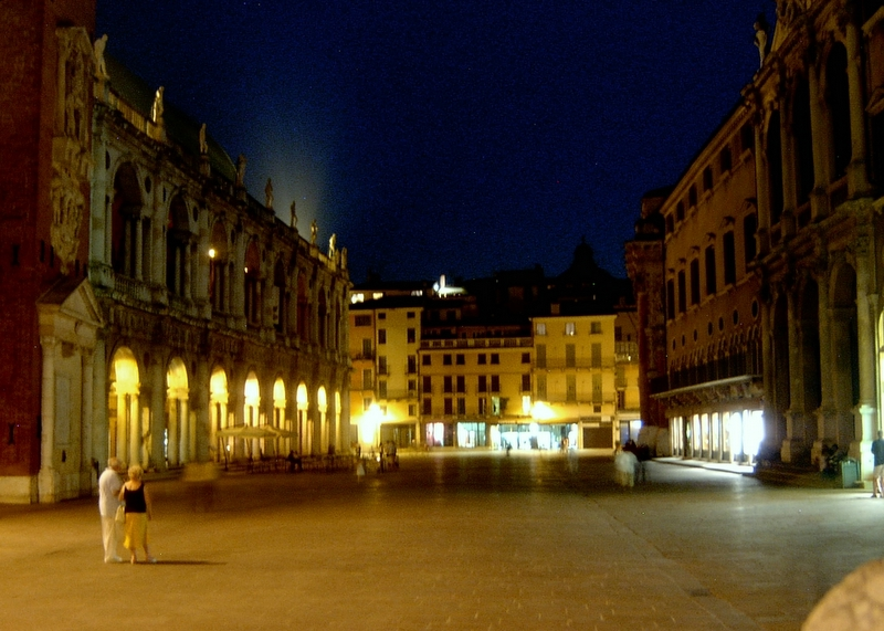 Notte, Vicenza, Italy.